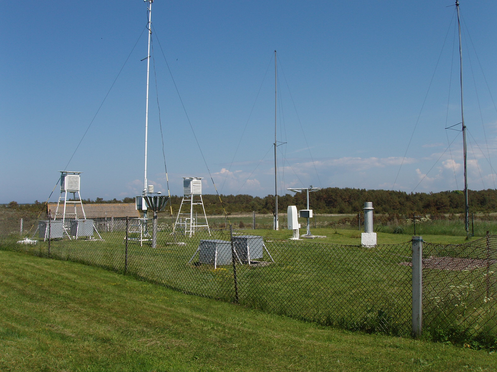 Vilsandi Meteoroloogiajaam tuletorni lähedal.